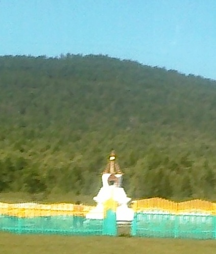 Баянгольский субурган